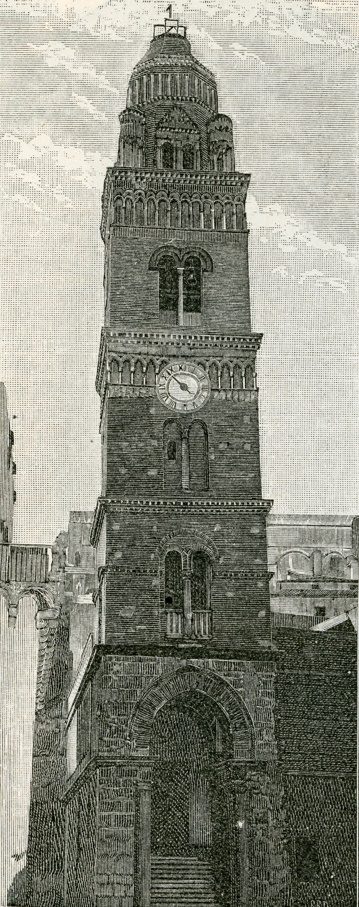 Gaeta: campanile della cattedrale (incisione di B.R.D. 1898).